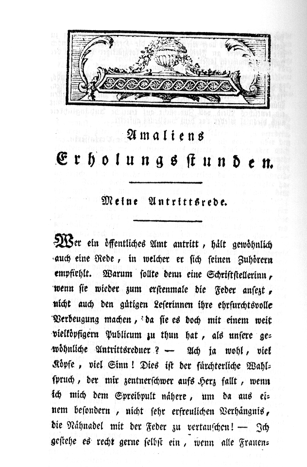 Scan der ersten Ausgabe von "Amaliens Erholungsstunden" von 1790